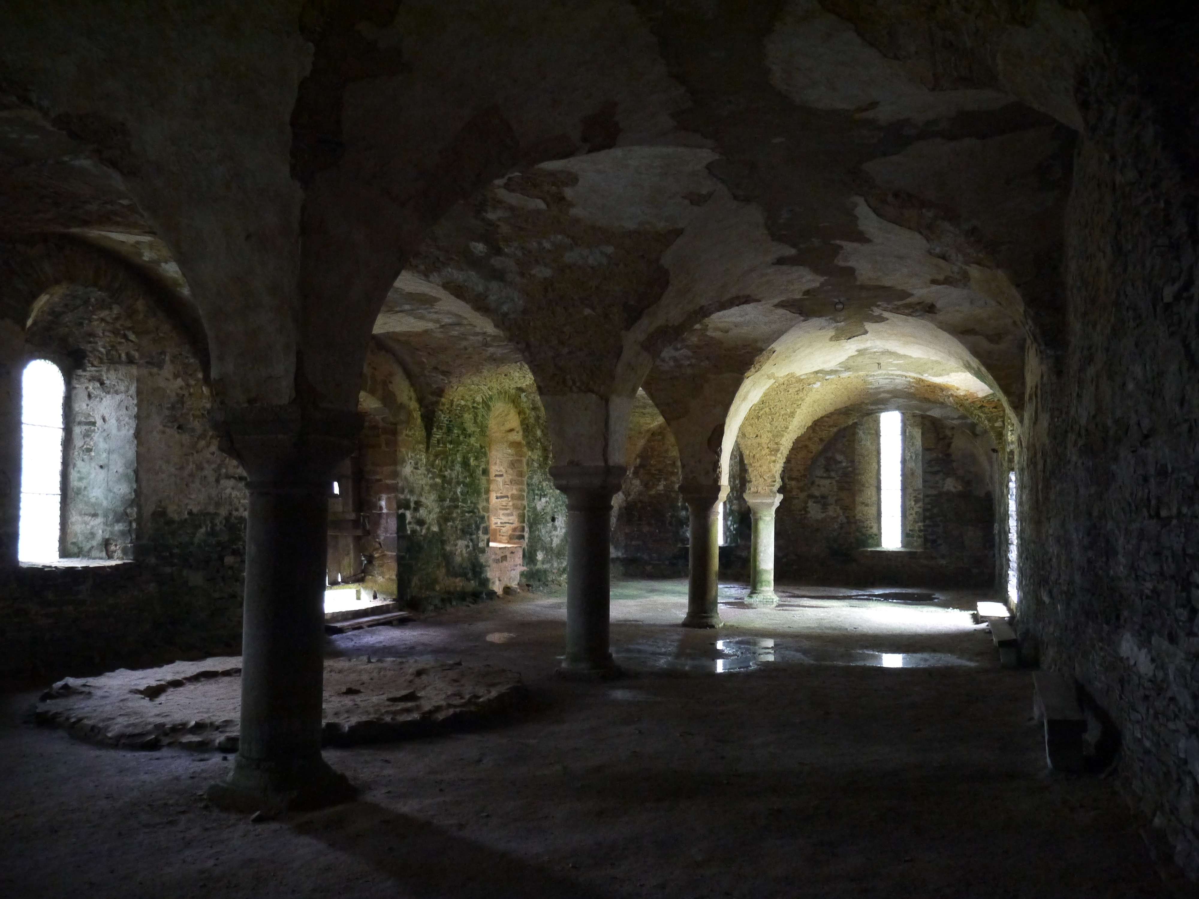 Abbaye de Clermont - cellier des convers